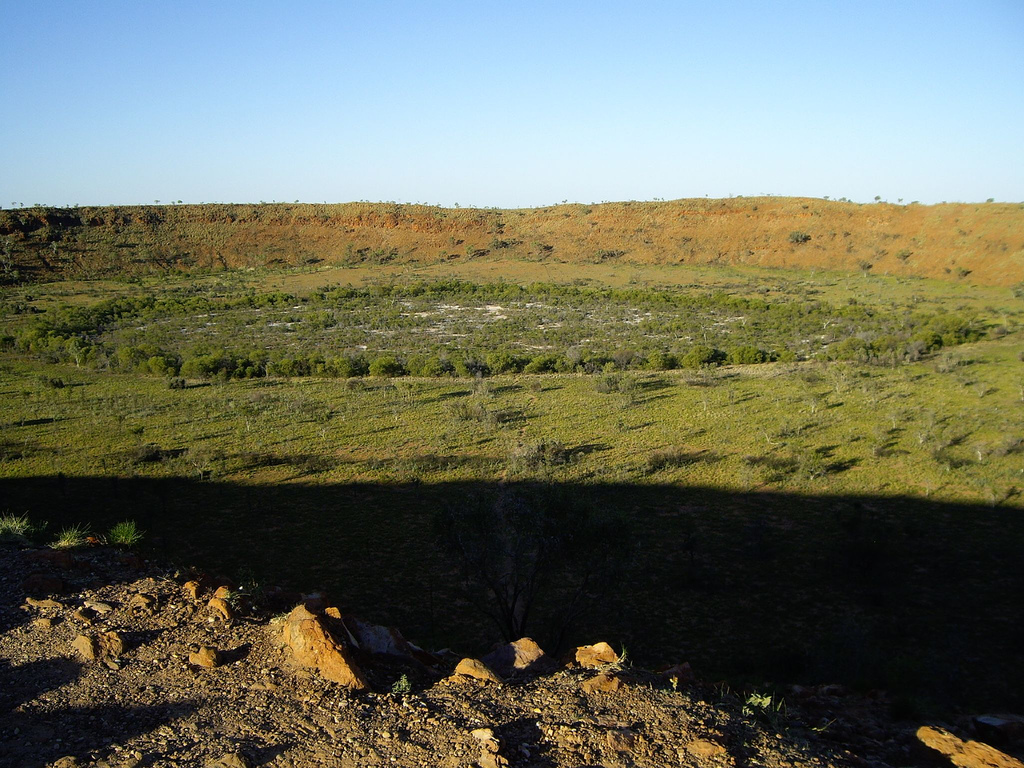 Cratère Wolfe en Australie-Occidentale